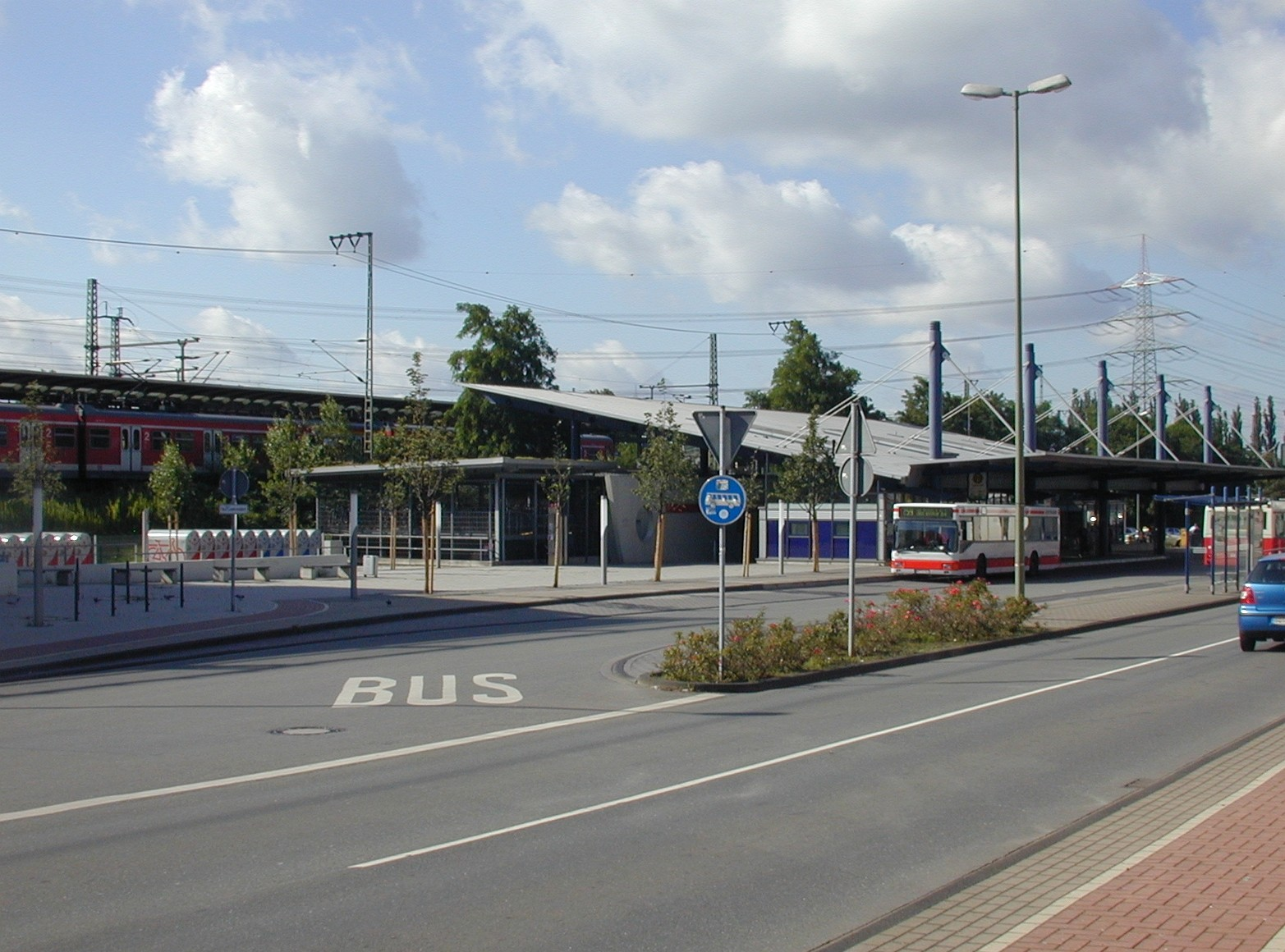 Bottrop HBF